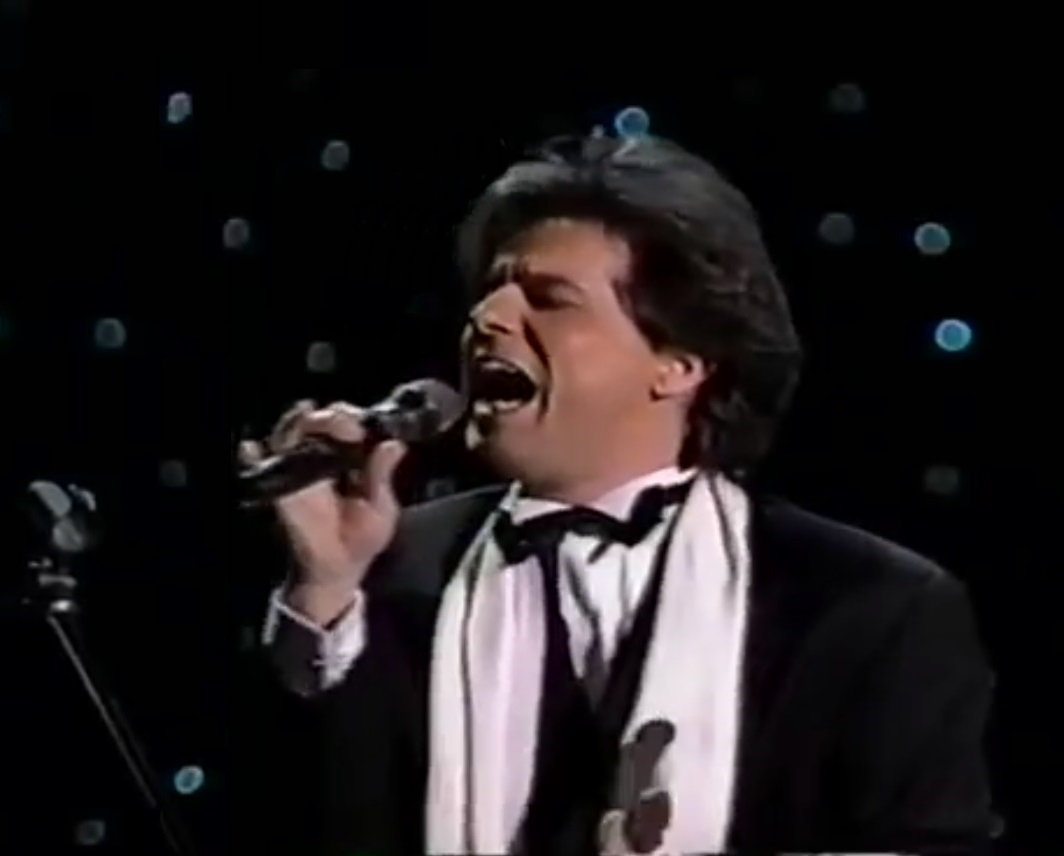 Rudy La Scala en un concierto, en 1996